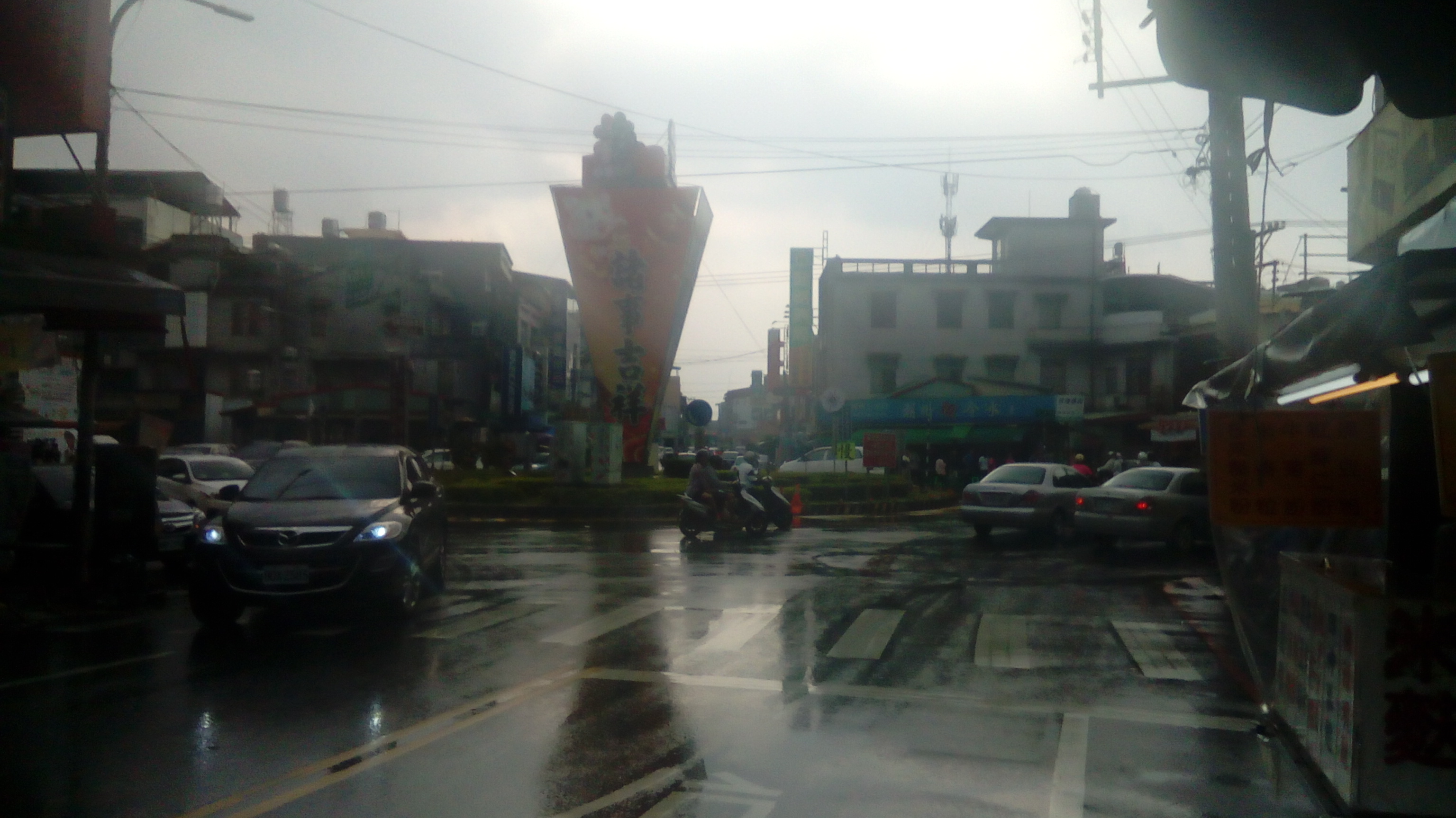 即屏85鄉道 長興路及清水路的交界口